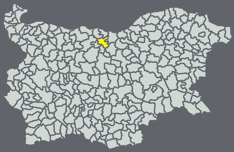 Община Левски на картата на България